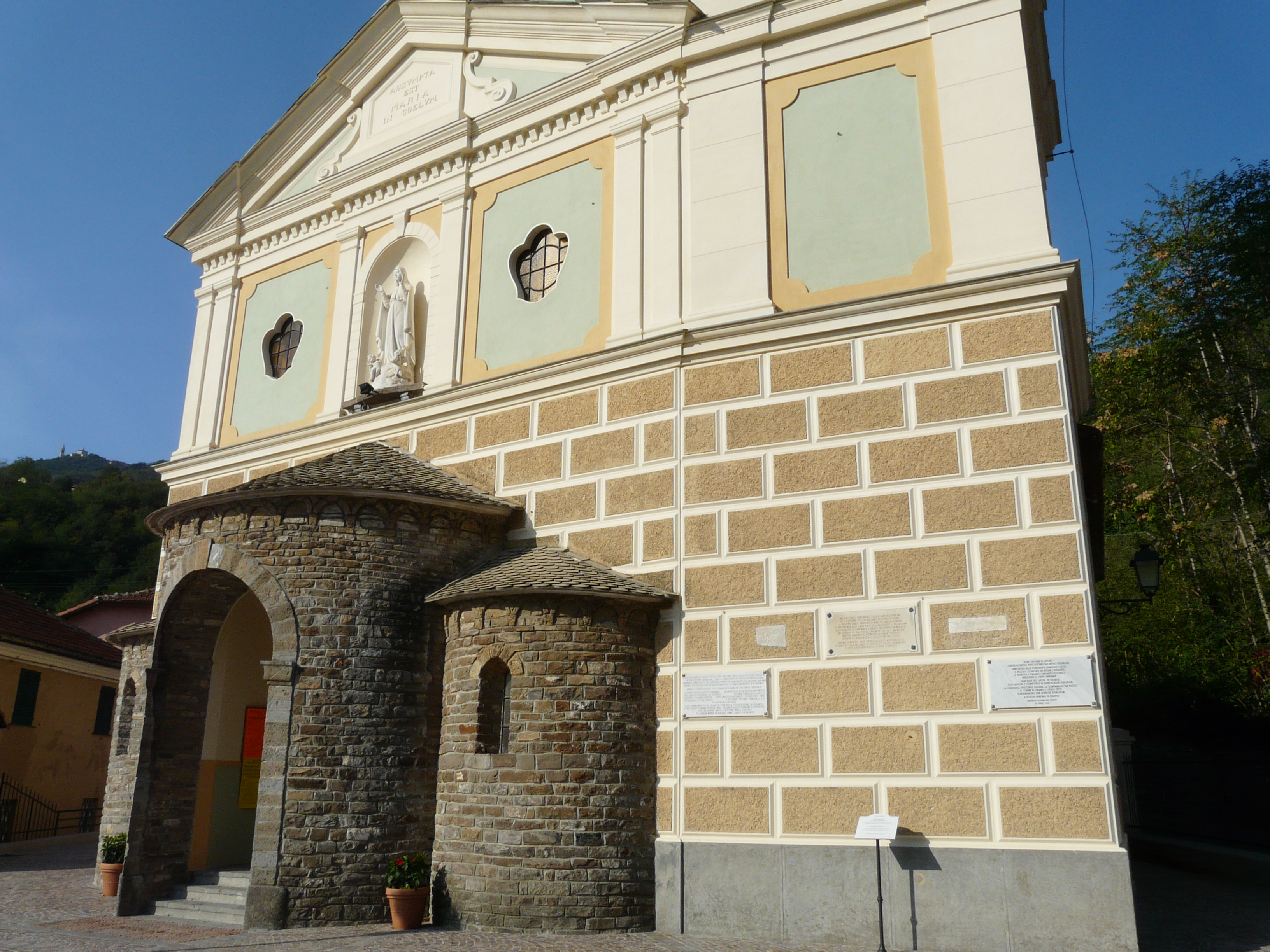 Chiesa di Santa Maria Assunta, Ceranesi, Liguria, Italia